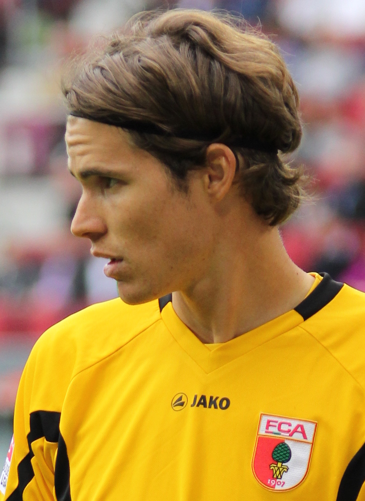 Porträt von Marwin Hitz (ausgeschnitten aus einem Bild von Stephan Eissler)